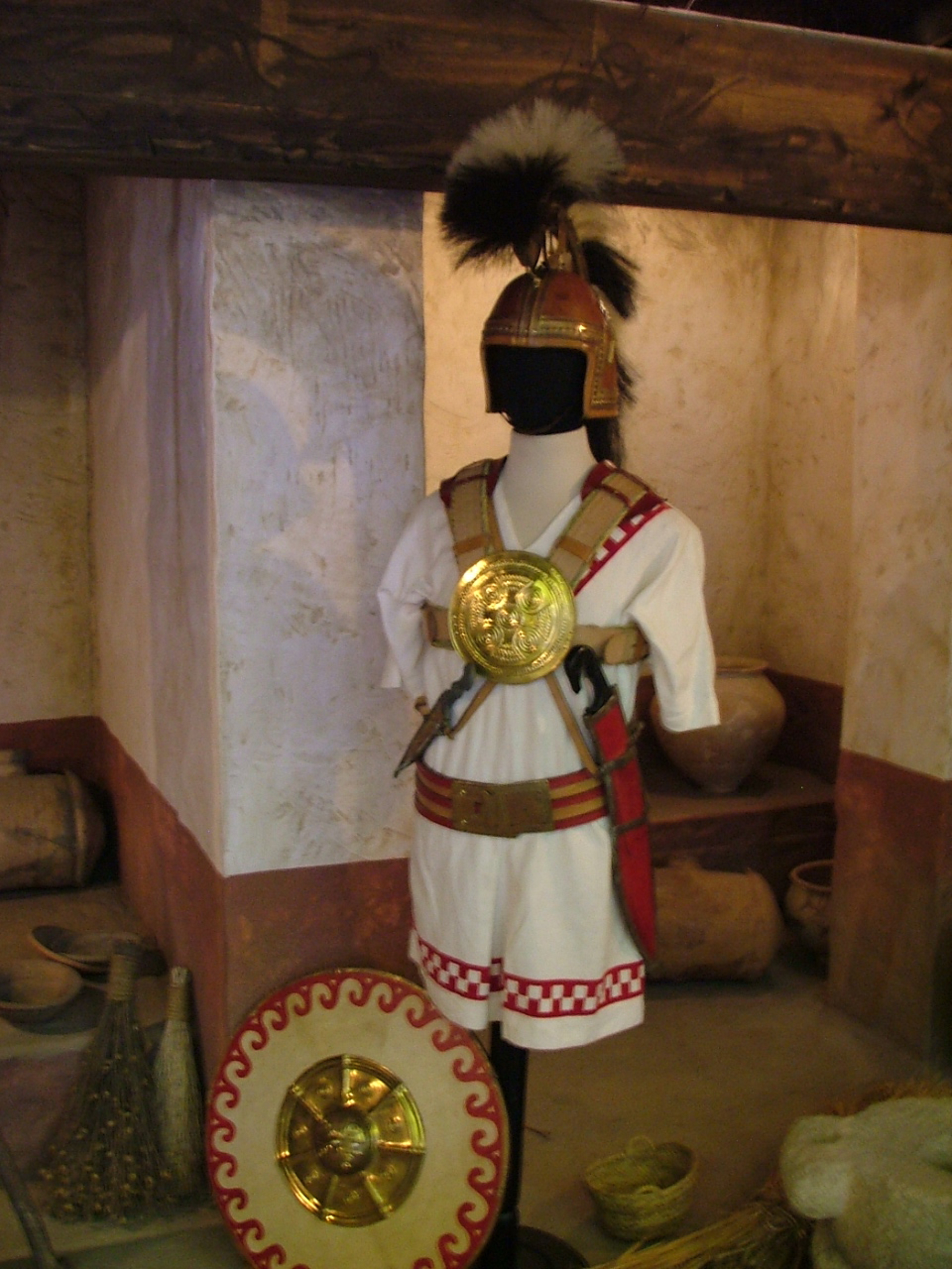 Réplica de guerrero ibero y sus armas. Museo de Prehistoria de Valencia.